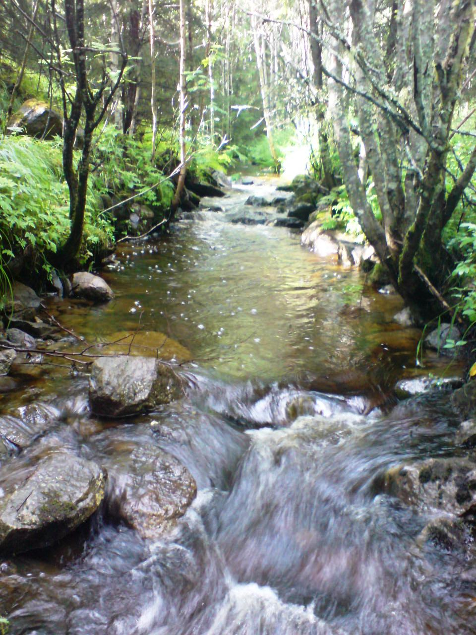 Dalsbekken på Lierfoss i Aurskog-Høland.